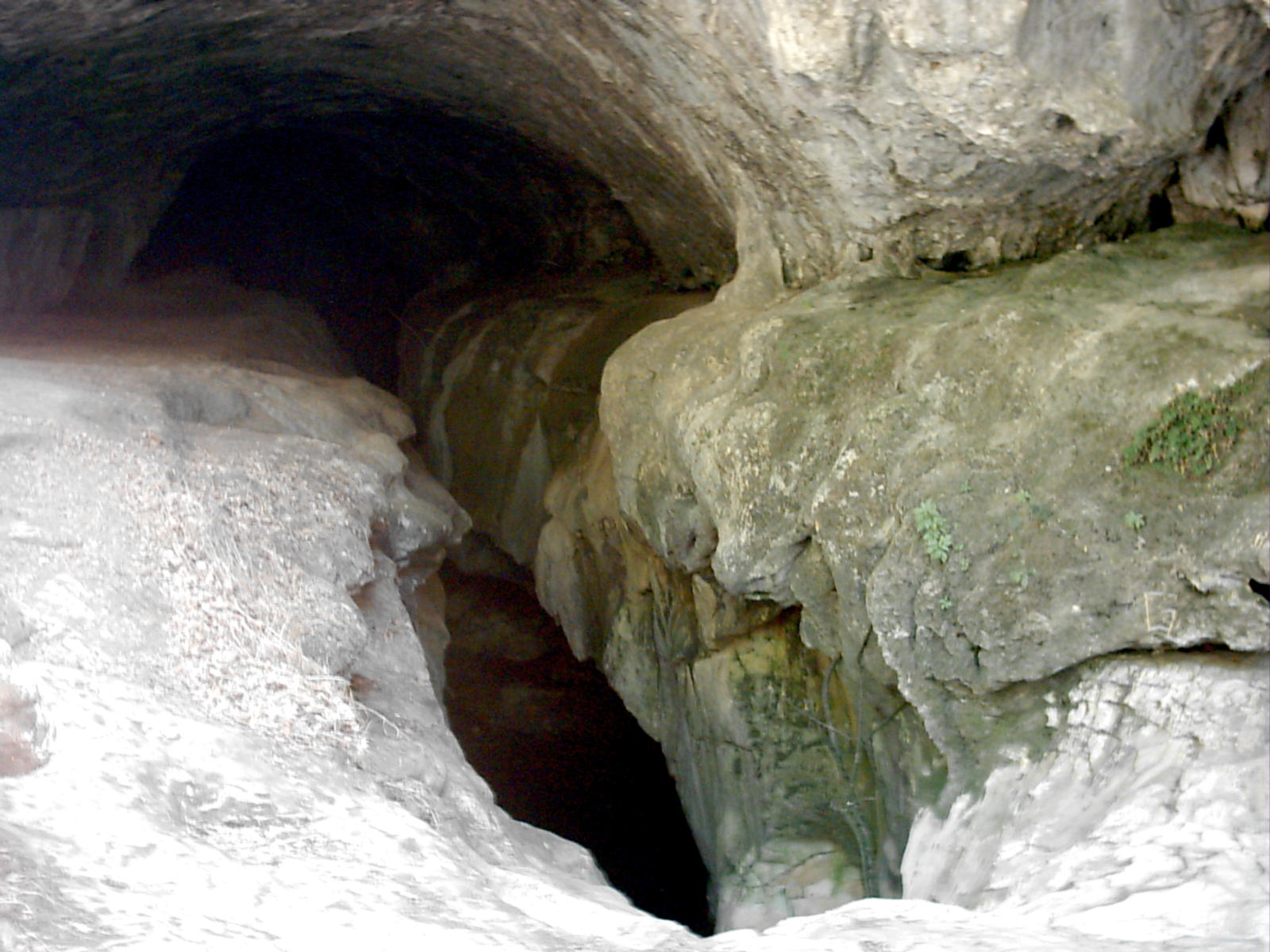 Perda da Ribeira dos Amiais — Karst formation in Rio Alviela, Portugal.